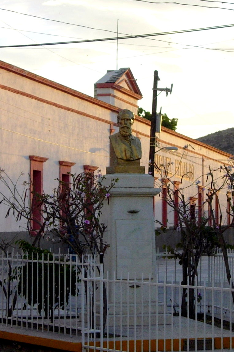 Monumento a Manuel Villasana Ortiz, en Cd. Tula, Tamaulipas.